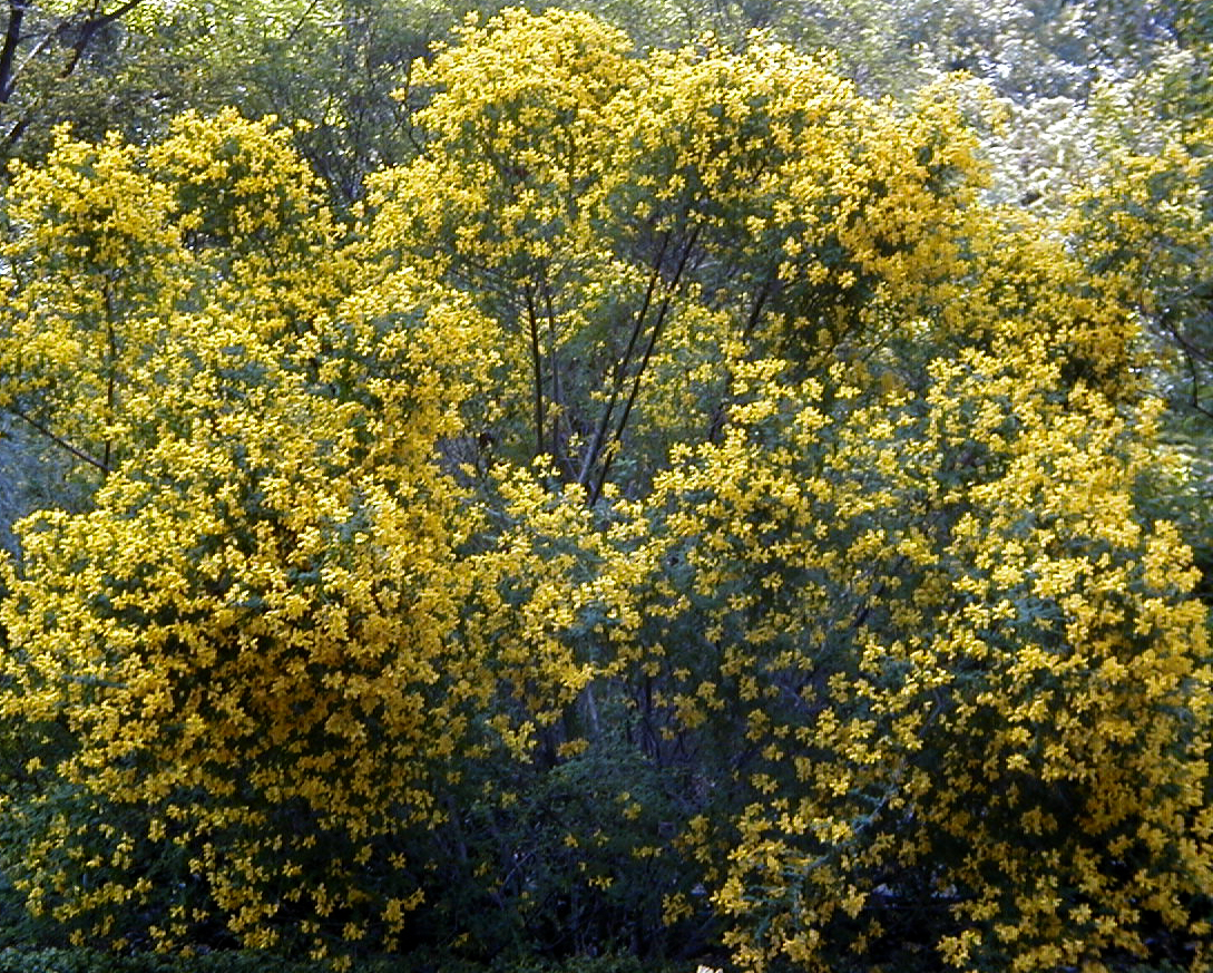 Cytisophyllum sessilifolium. Real Jardín Botánico, Madrid